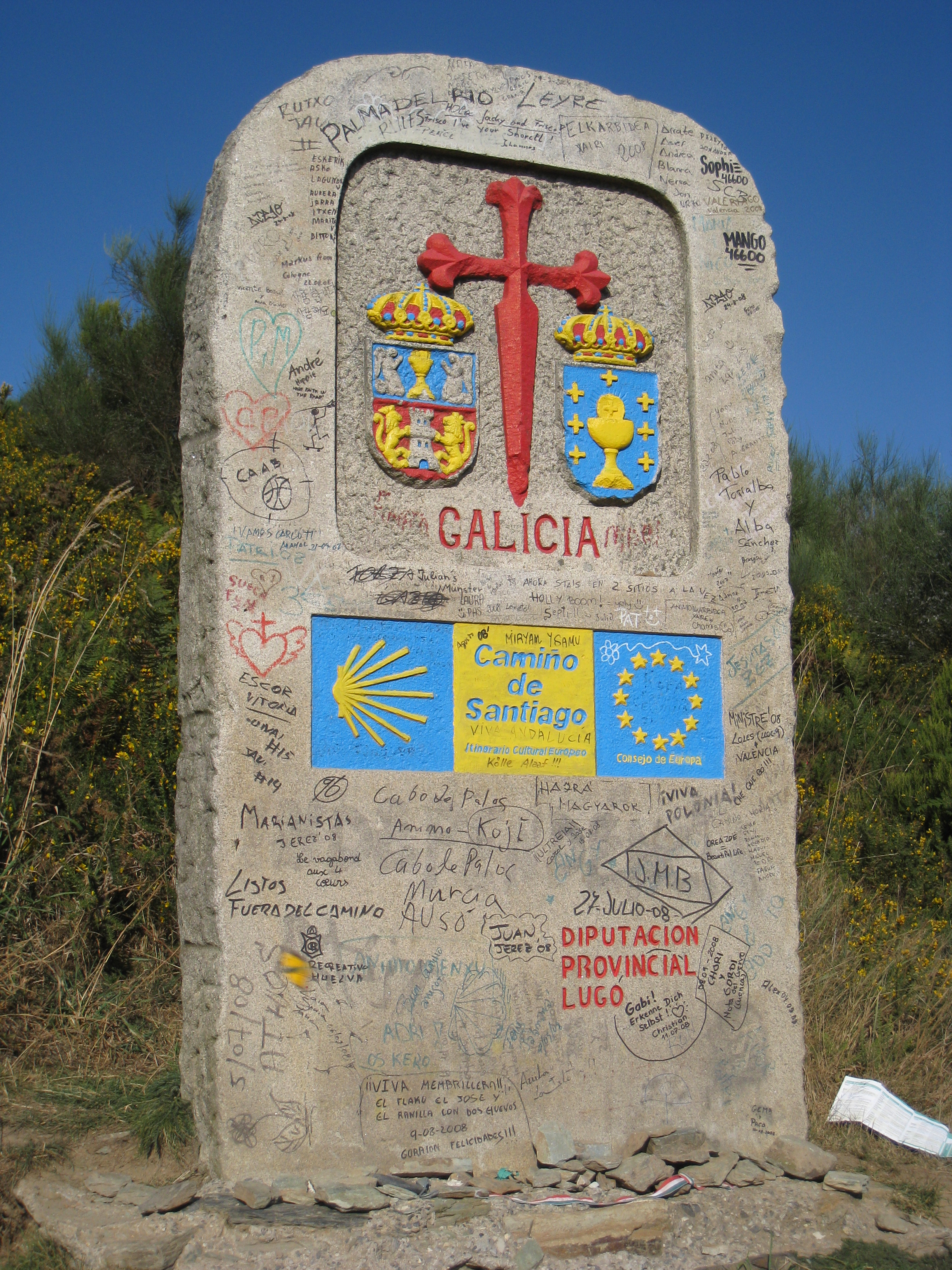 Ein Stein ca 1km vor O Cebreiro und ca 1km nach Laguna de Castilla